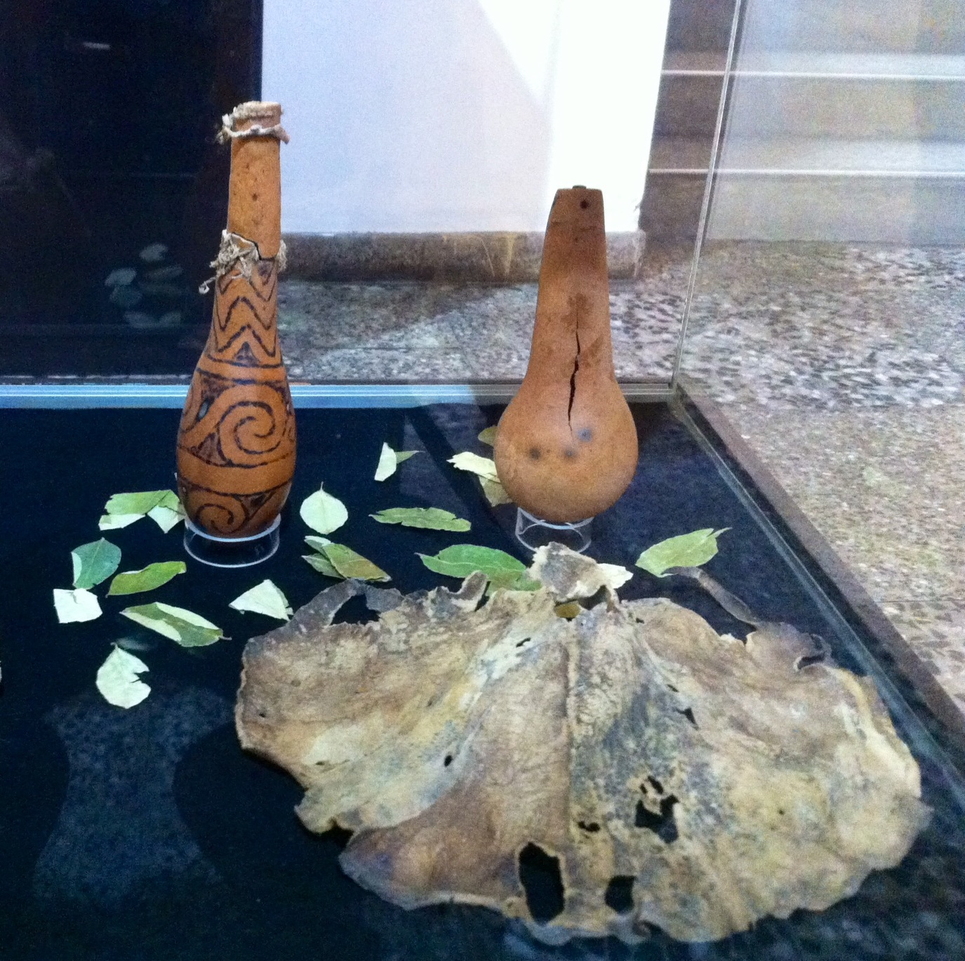 Este puru se encontró dentro del contexto de las tumbas encontradas en Huacauya, distrito de Huasta, provincia de Bolognesi en Áncash y expuestas en el Museo Arqueológico de Áncash el 2017.